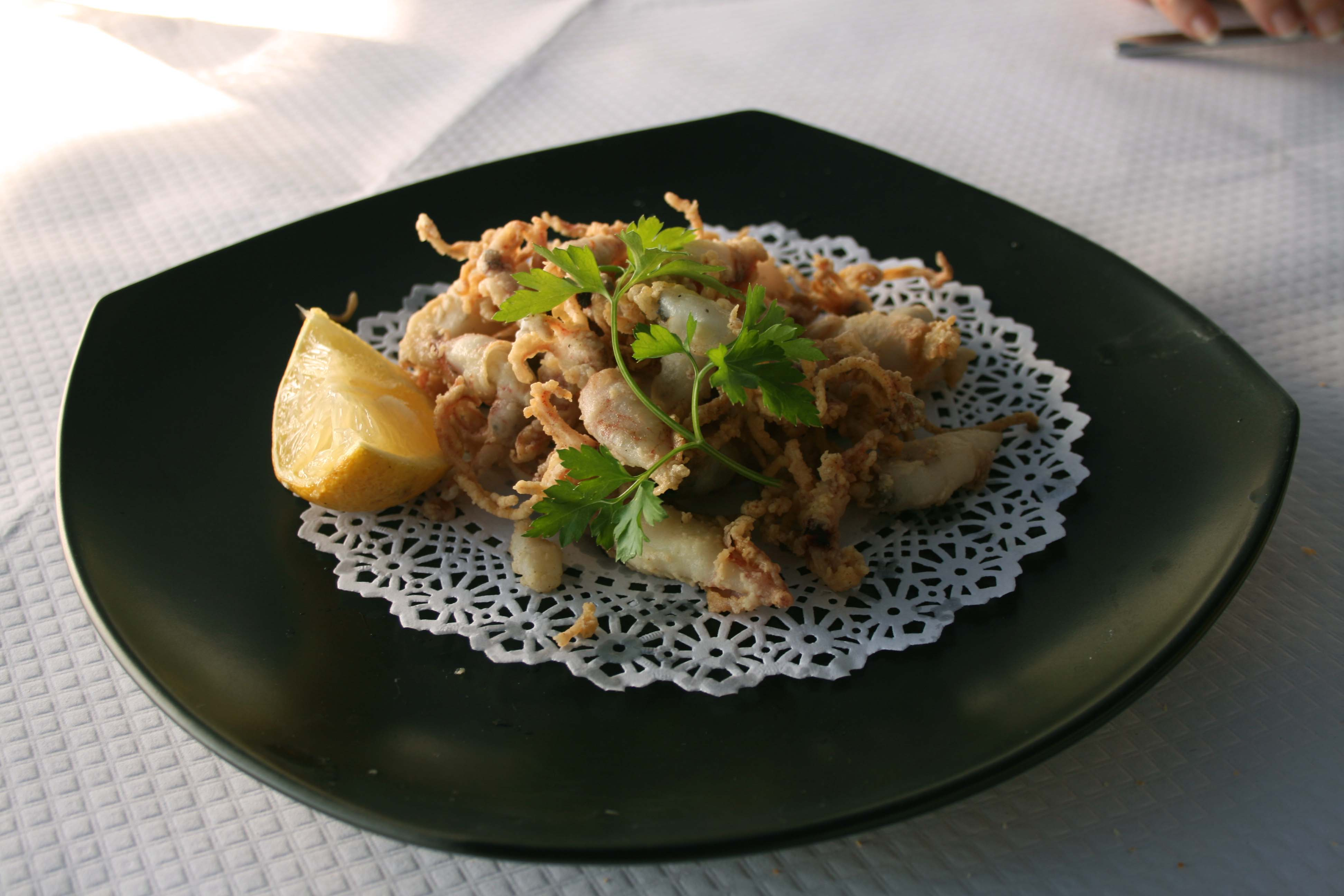 Ración de chipirones decorada con un perejil